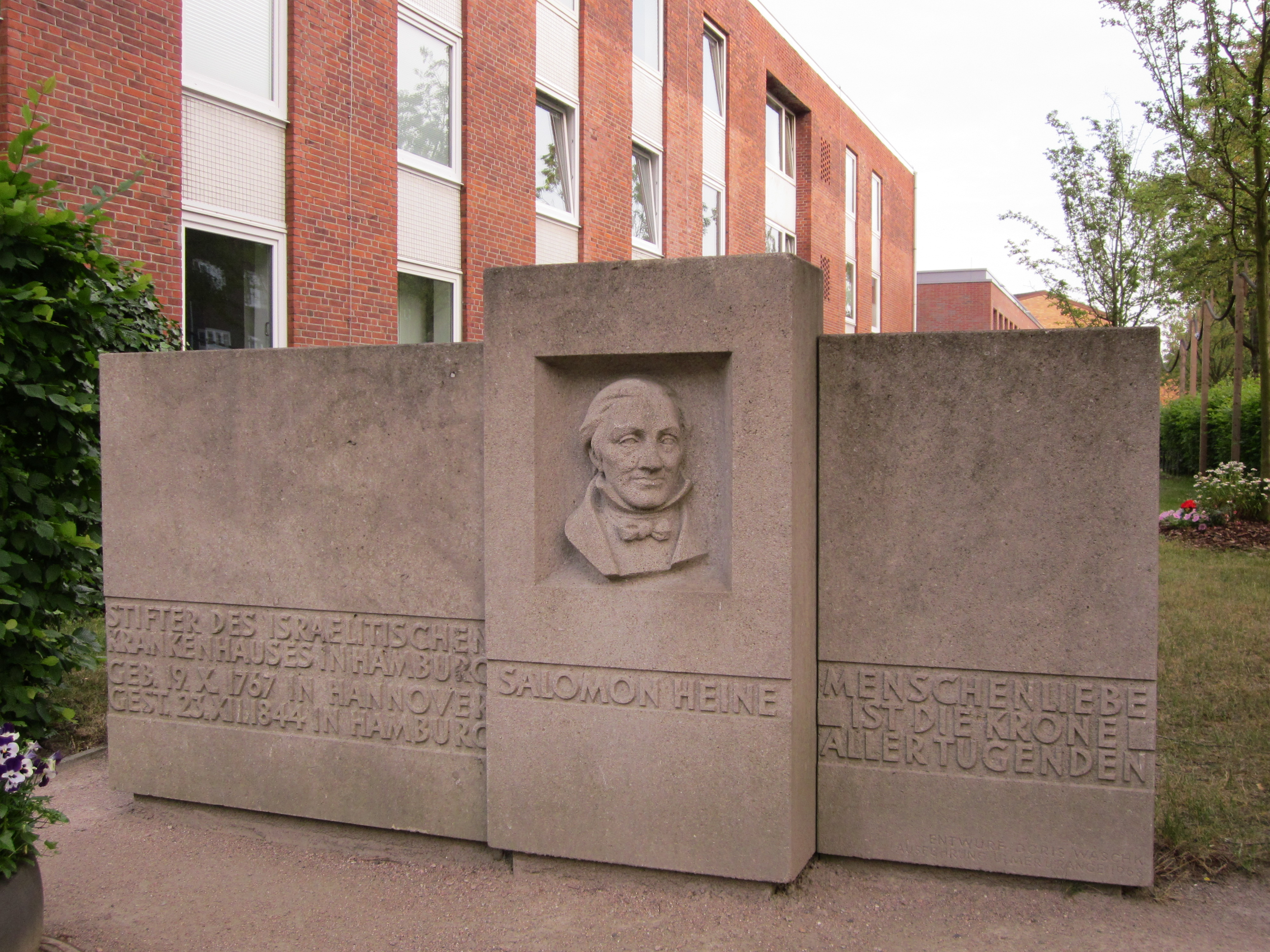 Gedenkstein für Salomon Heine am Israelitischen Krankenhaus Hamburg im Orchideenstieg in Alsterdorf, von Doris Waschk-Balz, 1968.